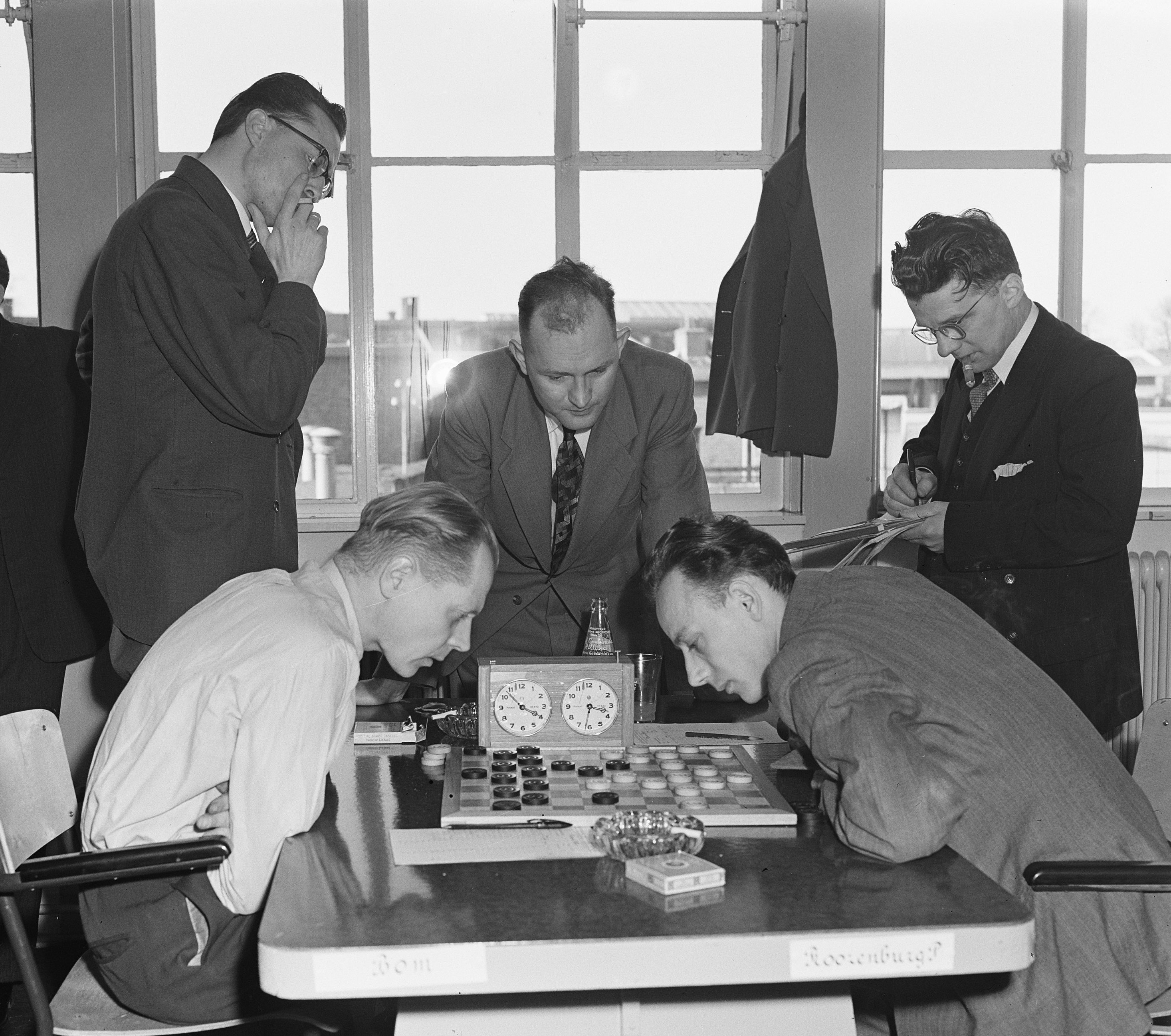 Collectie / Archief : Fotocollectie Anefo Reportage / Serie : [ onbekend ] Beschrijving : Damkampioenschap Nederland Utrecht Datum : 17 april 1954 Locatie : Utrecht Trefwoorden : damkampioenschappen Fotograaf : Rossem, Wim van / Anefo Auteursrechthebbende : Nationaal Archief Materiaalsoort : Glasnegatief Nummer archiefinventaris : bekijk toegang 2.24.01.09 Bestanddeelnummer : 906-4041